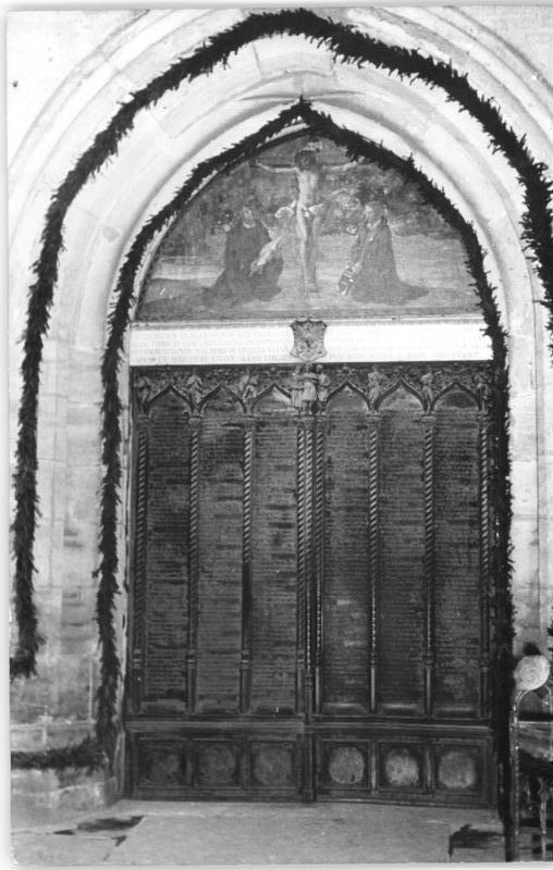 Wittenberg, Schlosskirche, Hauptportal, Thesentür Zentralbild Quasch. 20.10.1952 Zur 450- Jahrfeier der Martin- Luther- Universität Halle-Wittenberg vom 18. bis 25.10.1952 Während der Festwoche haben die auswärtigen Gäste die Gelegenheit, die historischen Stätten der alten Lutherstadt Wittenberg zu besichtigen. UBz: Die berühmte Thesentür an der Schloßkirche zu Wittenberg. Die Originalholztür verbrannte im Siebenjährigen Krieg(1760). 1857 wurde die Tür aus Bronze neuerschaffen, wobei die 95 Thesen Luthers gleich in die Bronzetür eingegossen wurden.